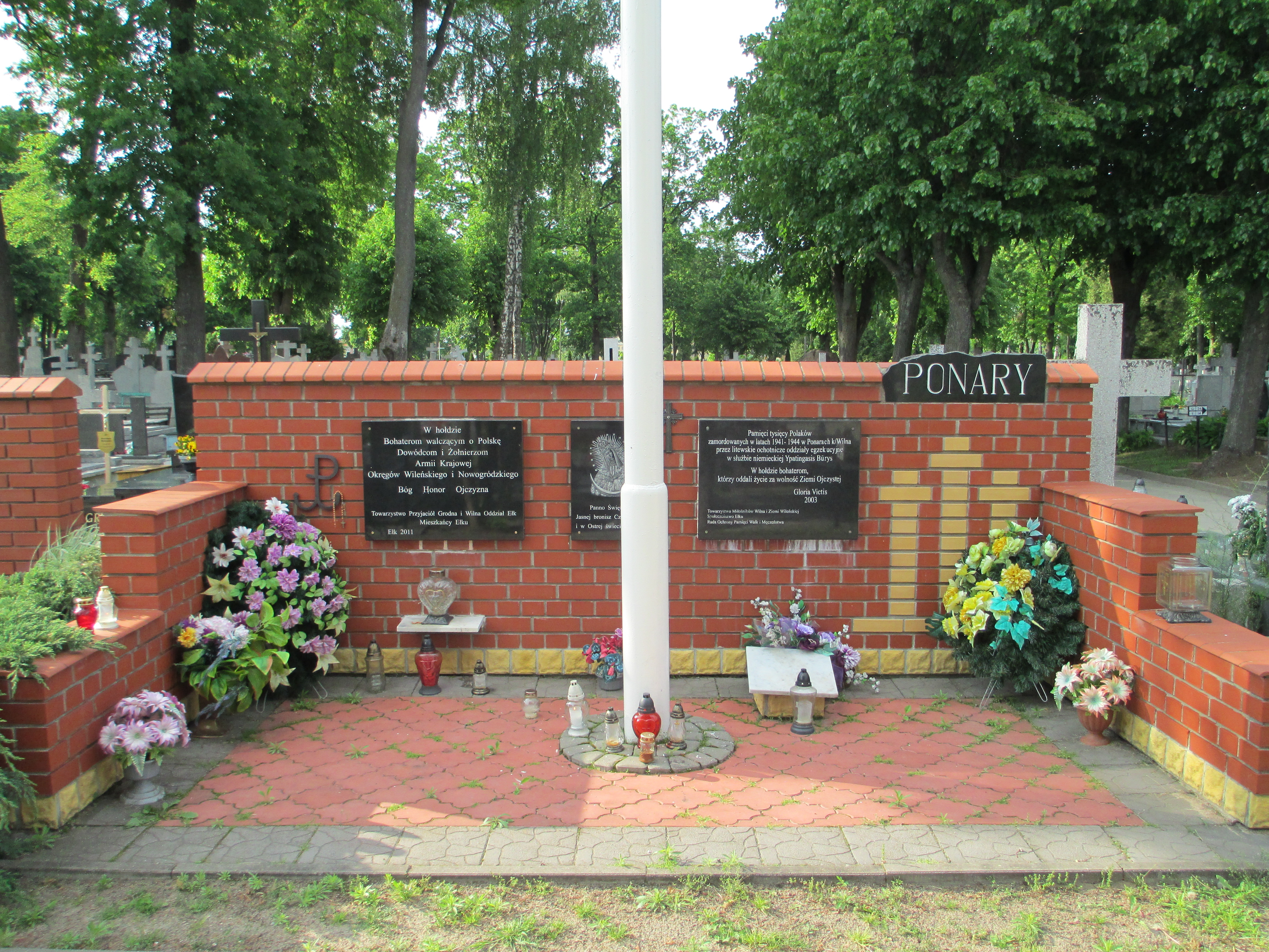 Ełk - Pomnik poległym w Ponarach